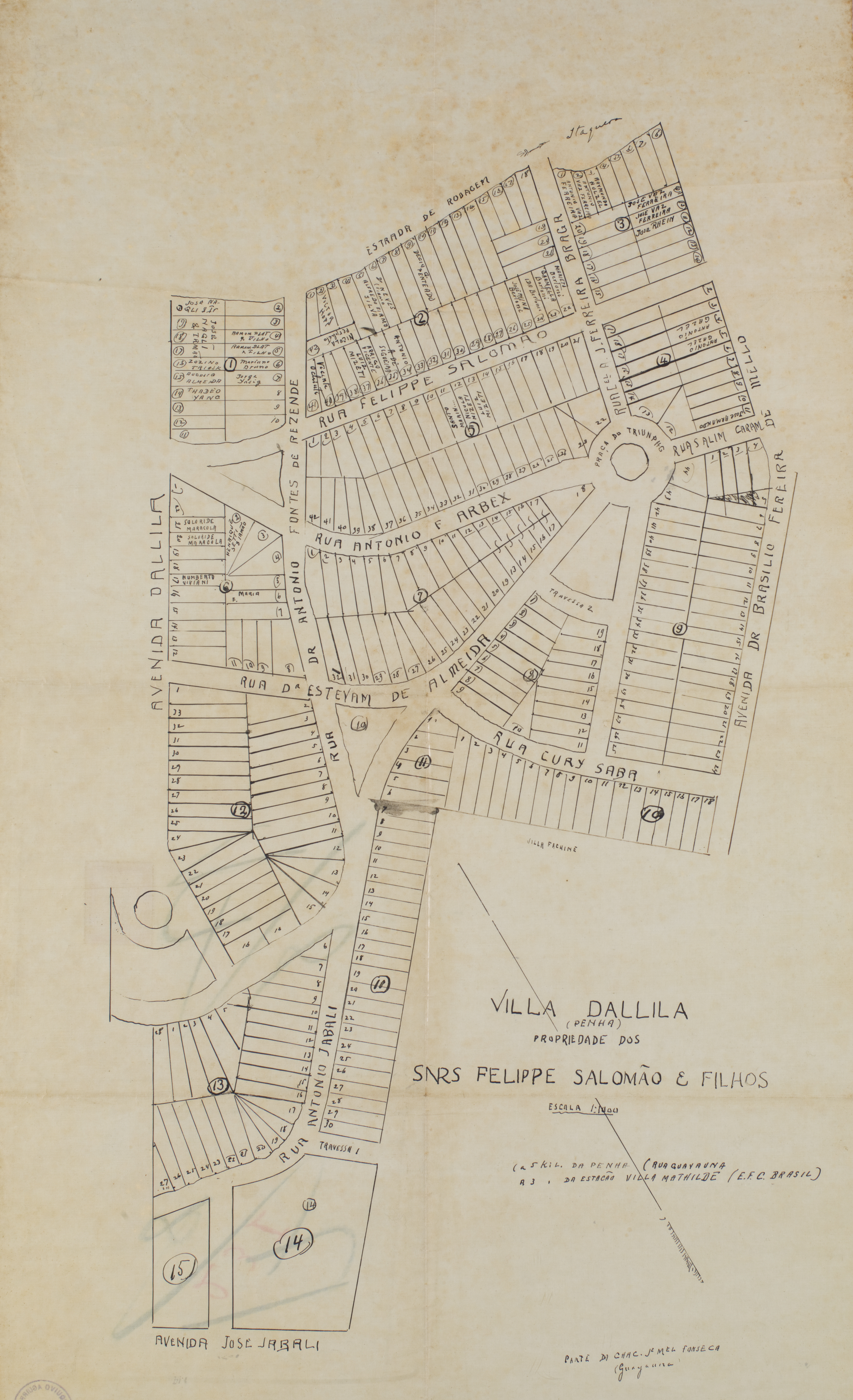 Obra que integra o acervo do Museu Paulista da USP. Coleção João Baptista de Campos Aguirra